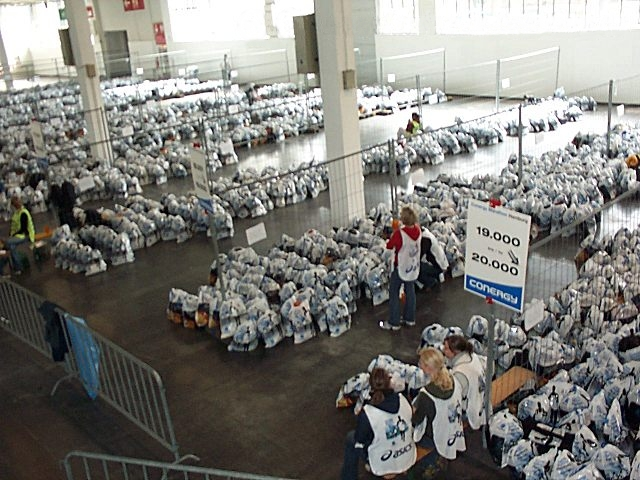 21. Conergy Marathon Hamburg 2006. 20000 sortierte Kleiderbeutel warten auf ihre Besitzer.